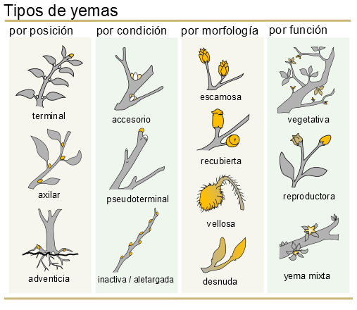 Clasificación de yemas en botánica por categoría.